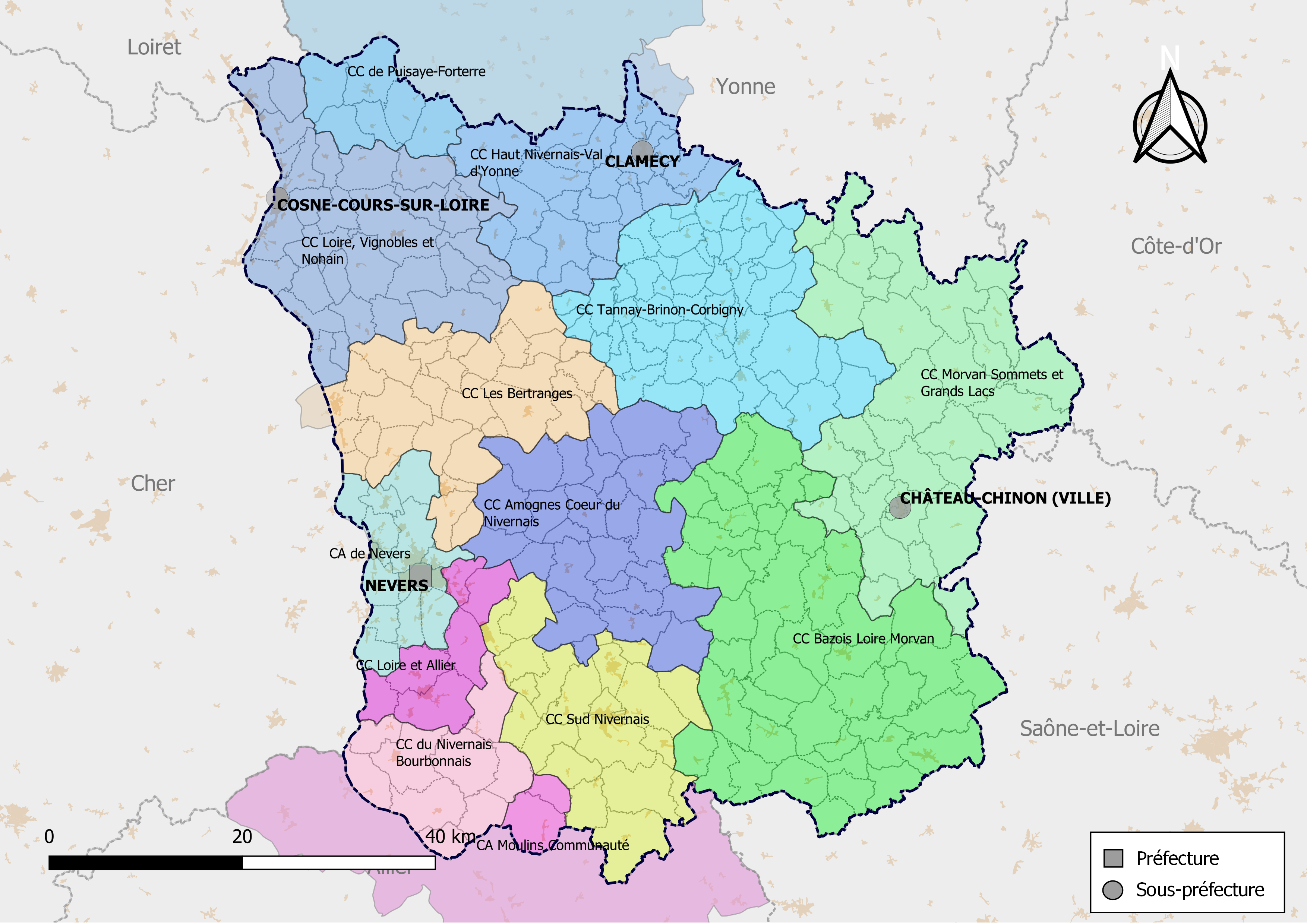 Carte des intercommunalités du département de la Nièvre, France. Composition au 1er janvier 2019.